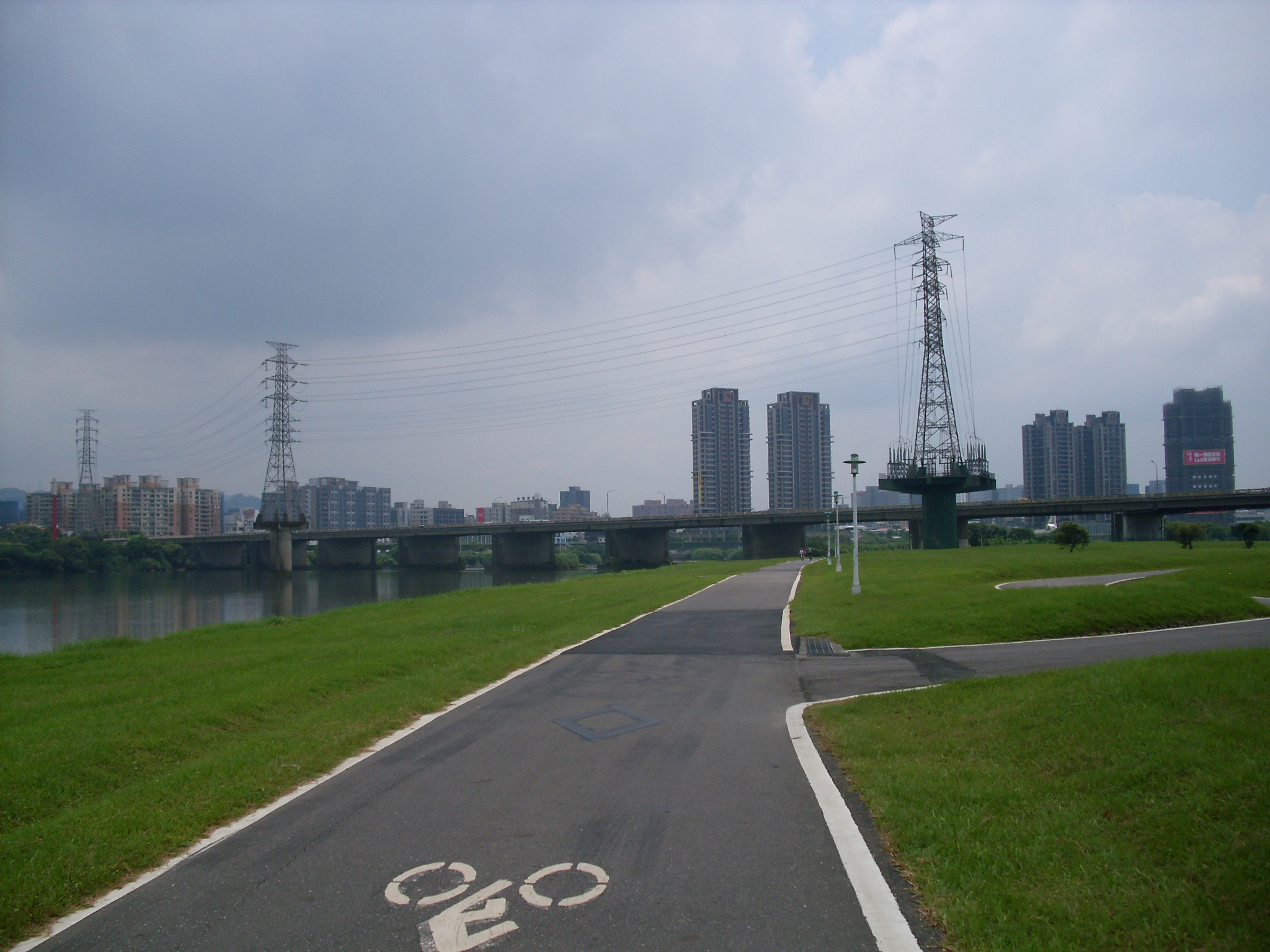 Bân-lâm-gú: 佇臺北市這爿翕的華中橋。